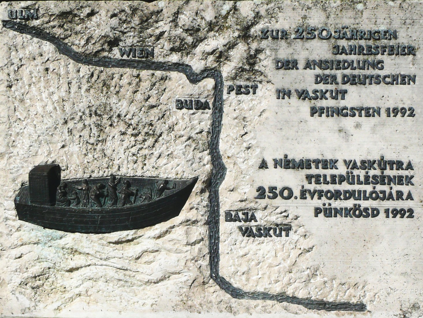 A németek Vaskútra településének 250. évfordulója alkalmából állított emléktábla Vaskúton